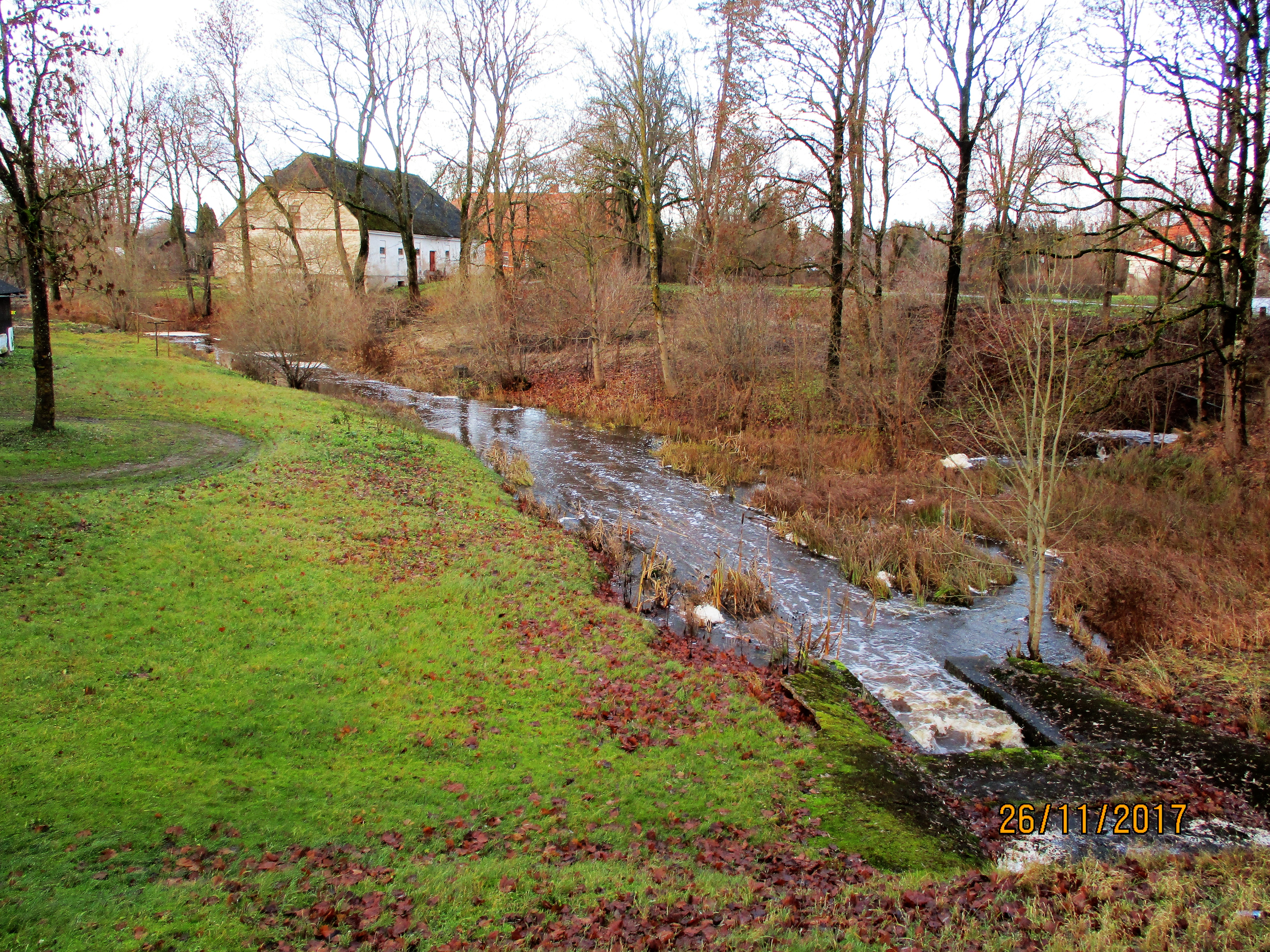 Vaade Stende mõisa veskipaisult põhja suunas endiste mõisa majandushoonete poole.